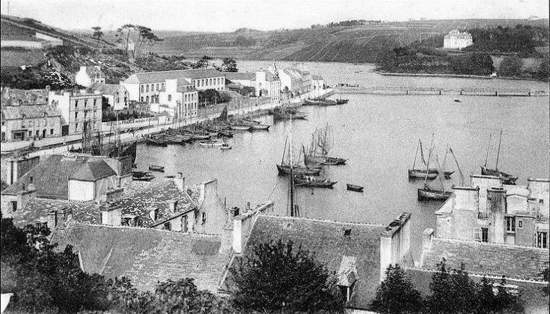 Audierne : vue générale du port vers 1900 (carte postale LL).